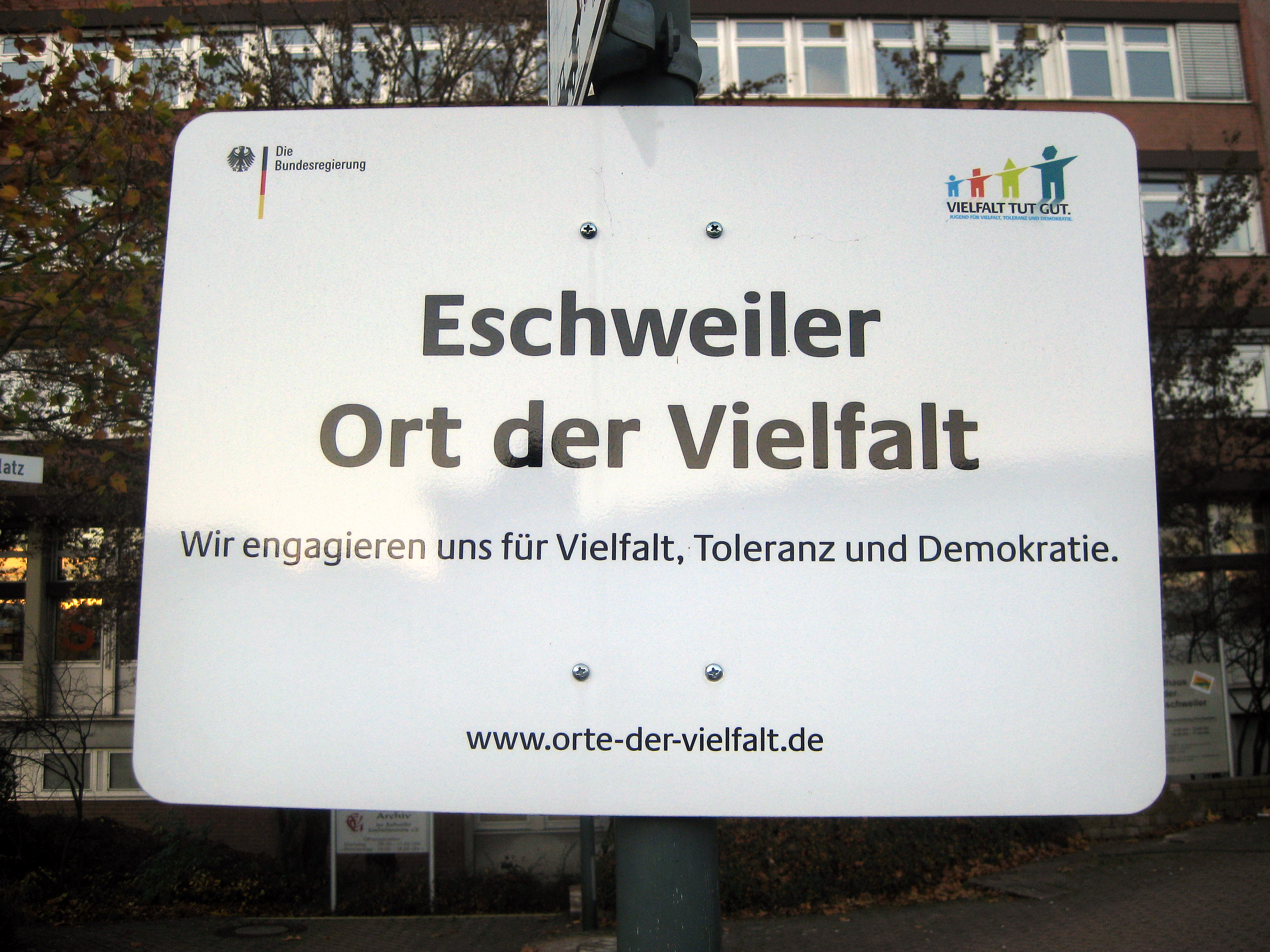 Schild "Ort der Vielfalt" vor dem Eschweiler Rathaus, Johannes-Rau-Platz